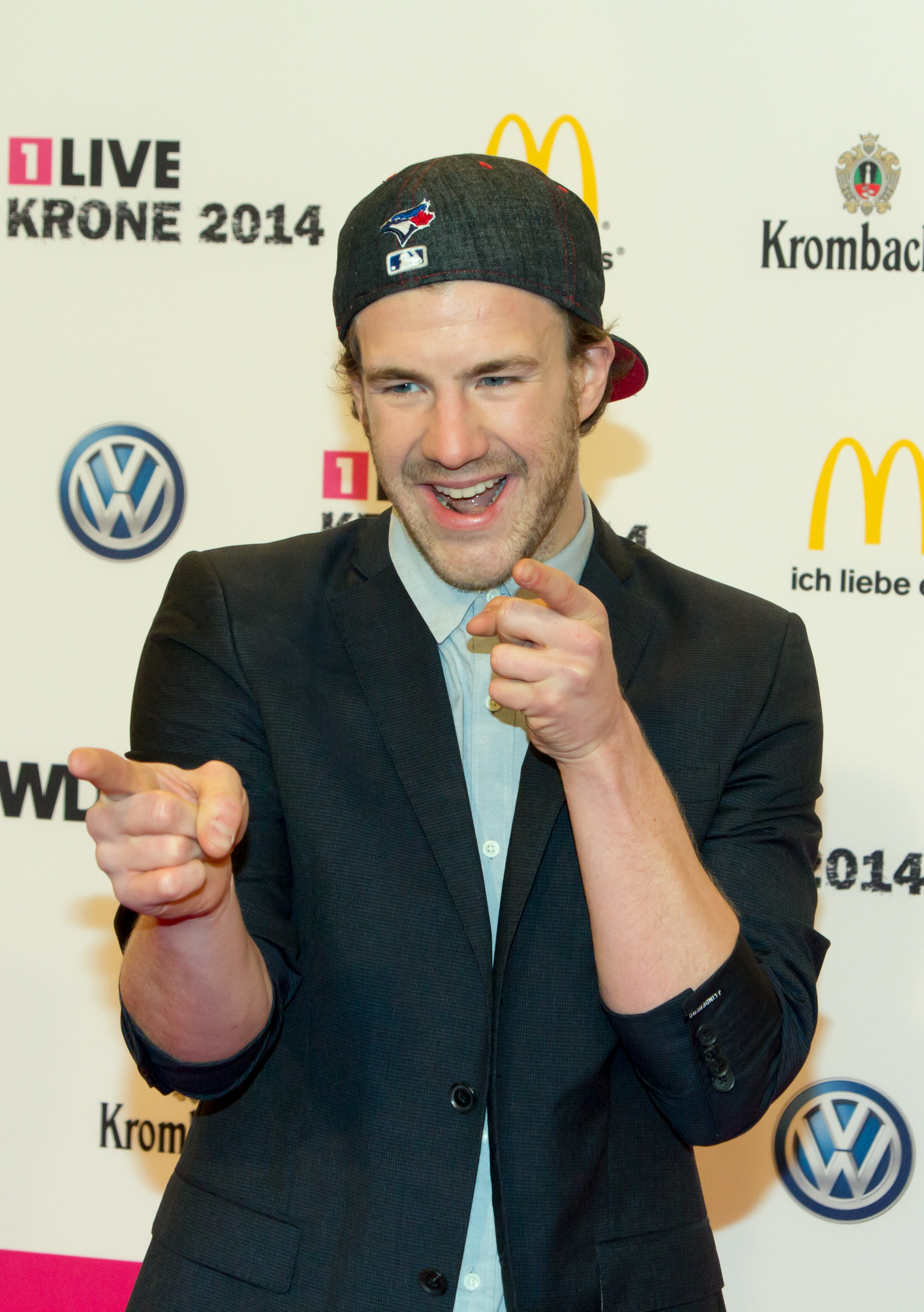 1LIVE Krone 2014 in der Bochumer Jahrhunderthalle: Luke Mockridge auf dem roten Teppich